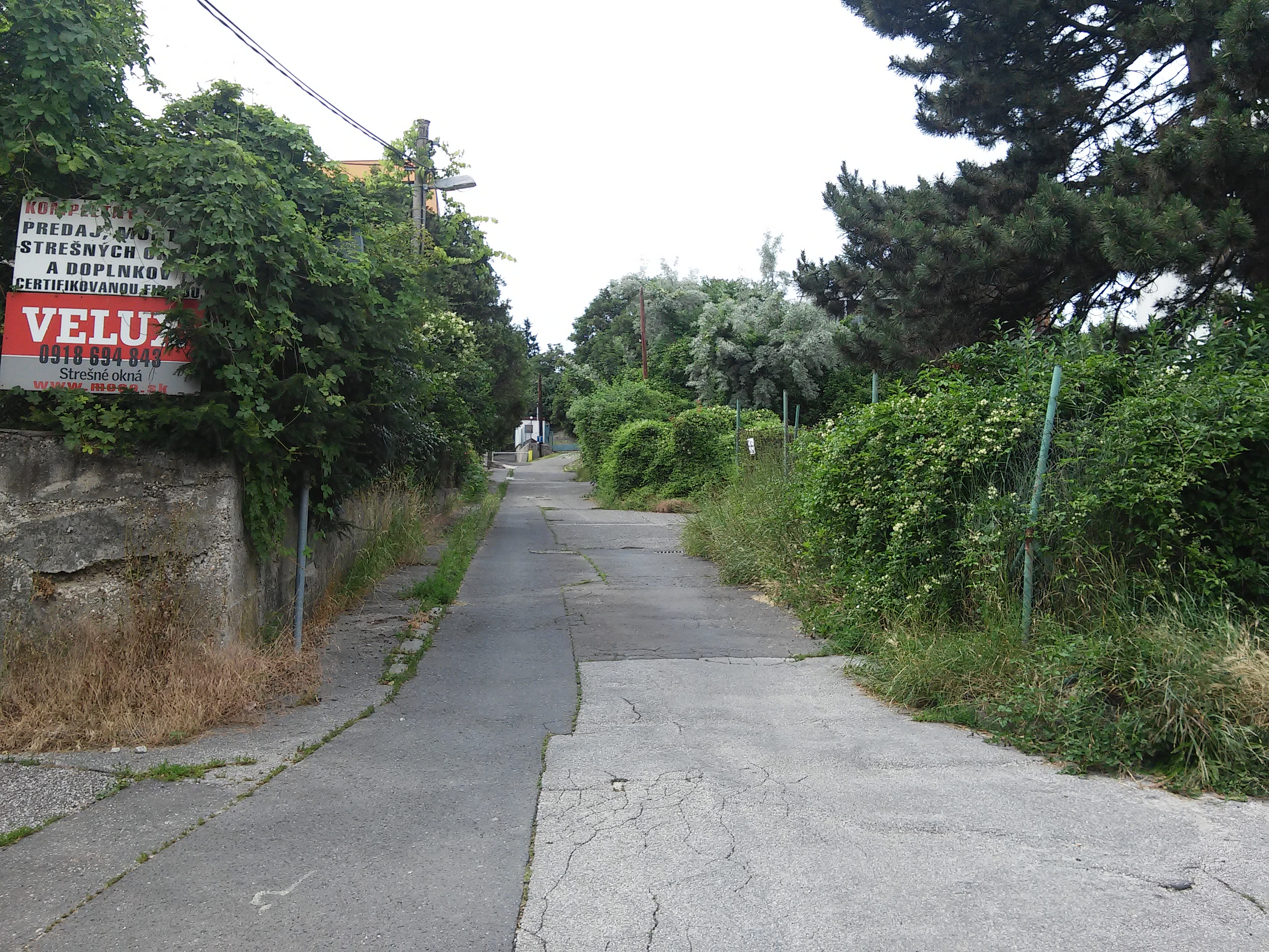 Pod Strážami, Nové Mesto, Bratislava